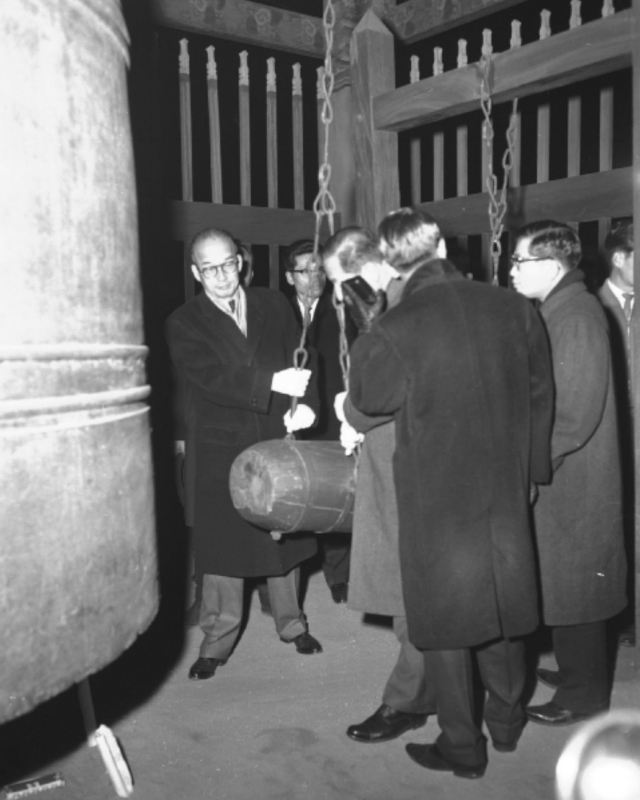 1963년 12월 31일 `제야의 종` 행사에서 신임 윤치영 서울시장이 타종을 했다.